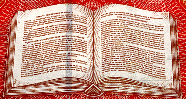 livre ouvert